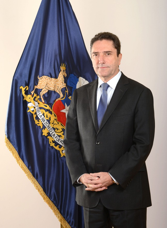 Ministro de Defensa Nacional de Chile Sr. José Antonio Gómez Urrutia.